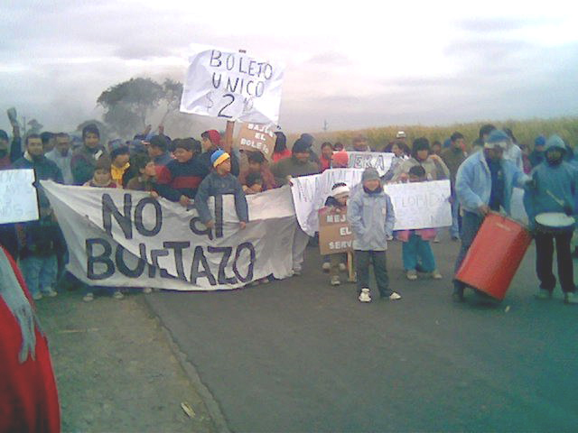 Corte de ruta durante la rebelión popular contra el aumento abusivo del boleto del transporte que une la localidad con la capital.